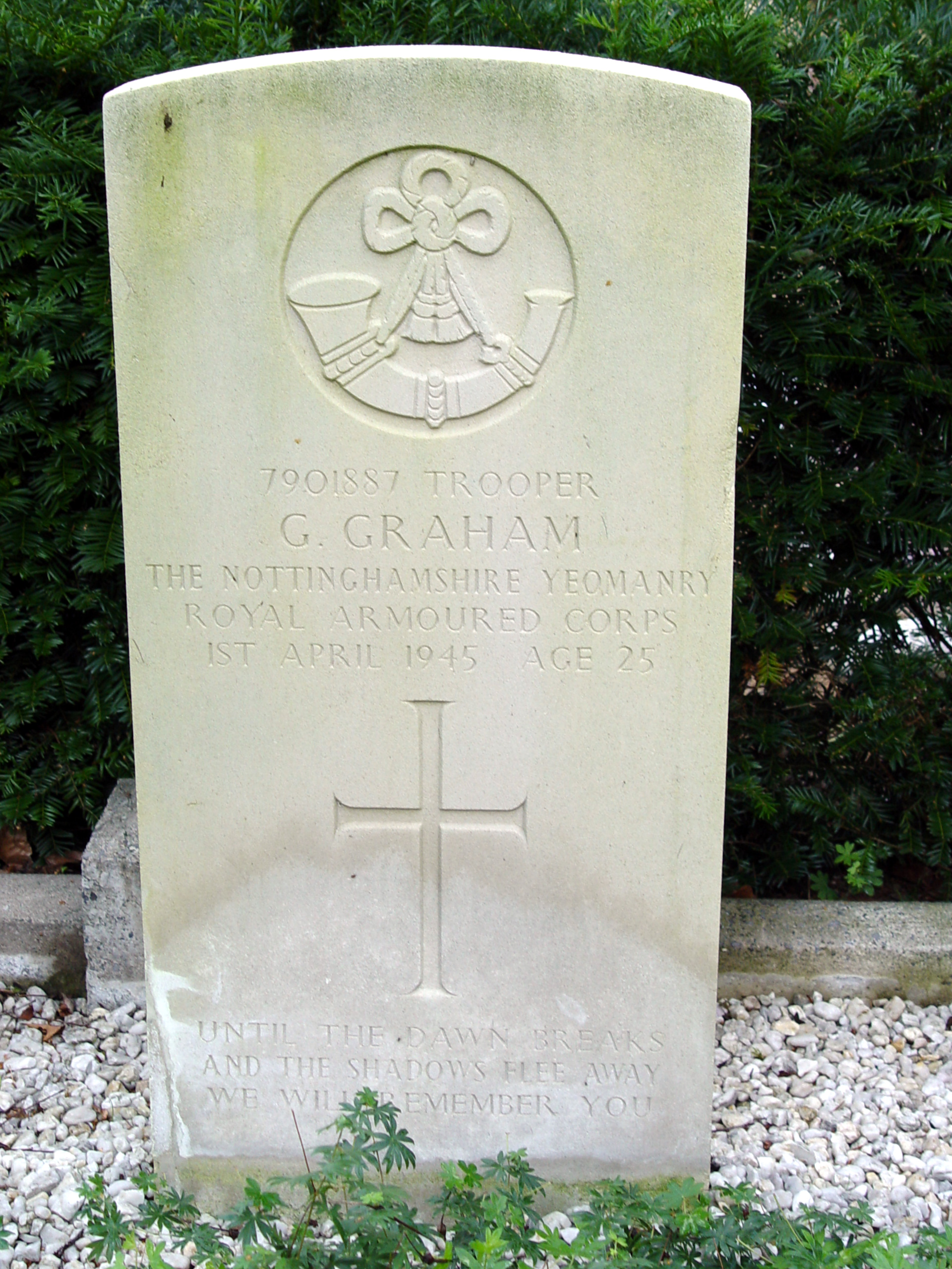 Barchem - G.Graham Rank: Trooper Service No: 7901887 Date of Death: 01/04/1945 Age: 25 Regiment/Service: Royal Armoured Corps Nottinghamshire Yeomanry